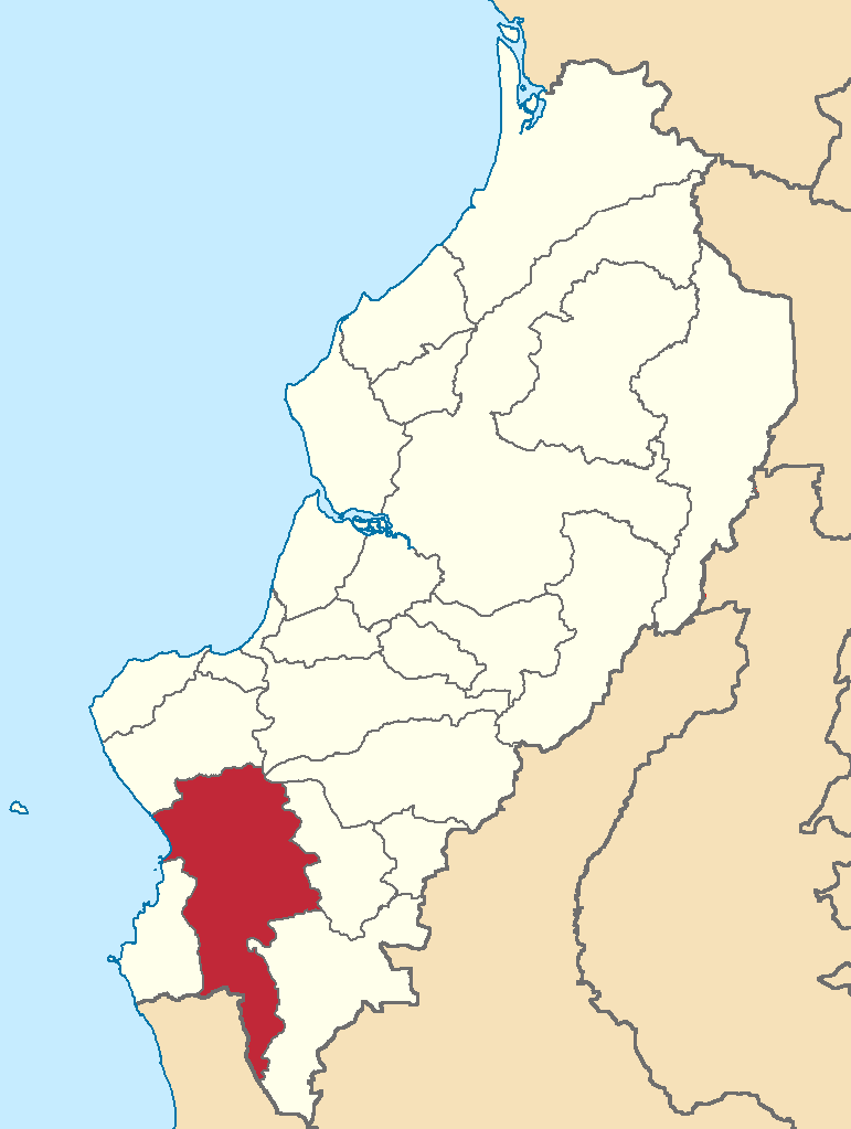 Mapa localizador del cantón en Manabí, Ecuador